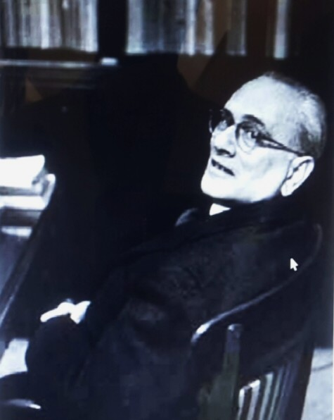 Saggi di giornalismo etnografico (1930-1933)